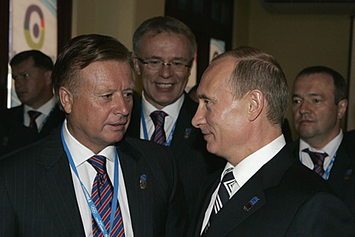 ГВАТЕМАЛА. С президентом Олимпийского комитета России Леонидом Тягачевым, главой Федерального агентства по физической культуре и спорту Вячеславом Фетисовым перед началом презентации Сочи – города-кандидата на проведение XXII зимних Олимпийских игр 2014 года.